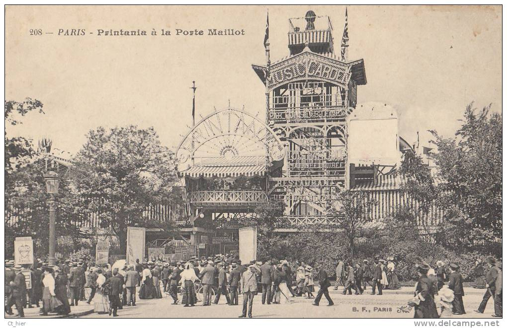 le printania ancêtre du luna-park porte maillot v